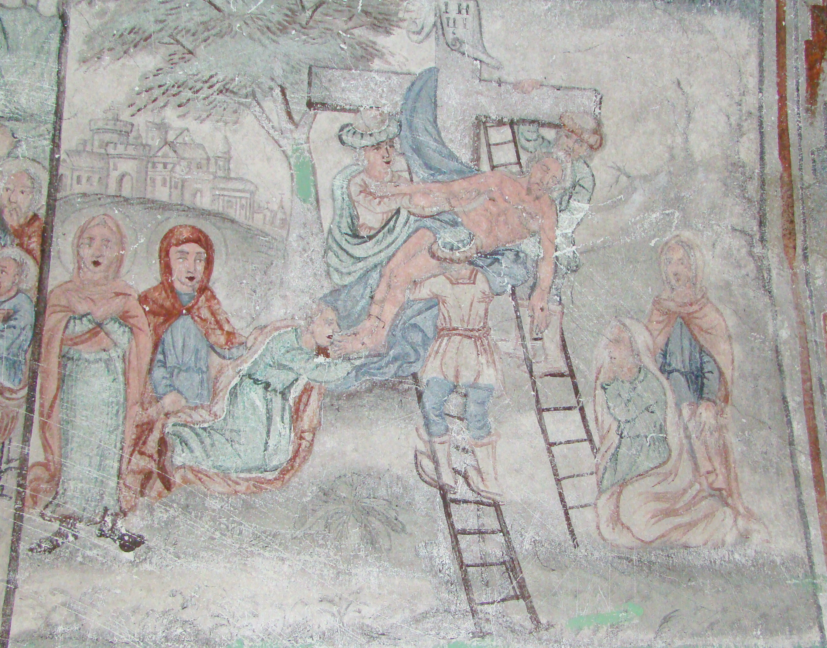 Biserica „Sf. Dumitru”, sat Poieni; comuna Vidra